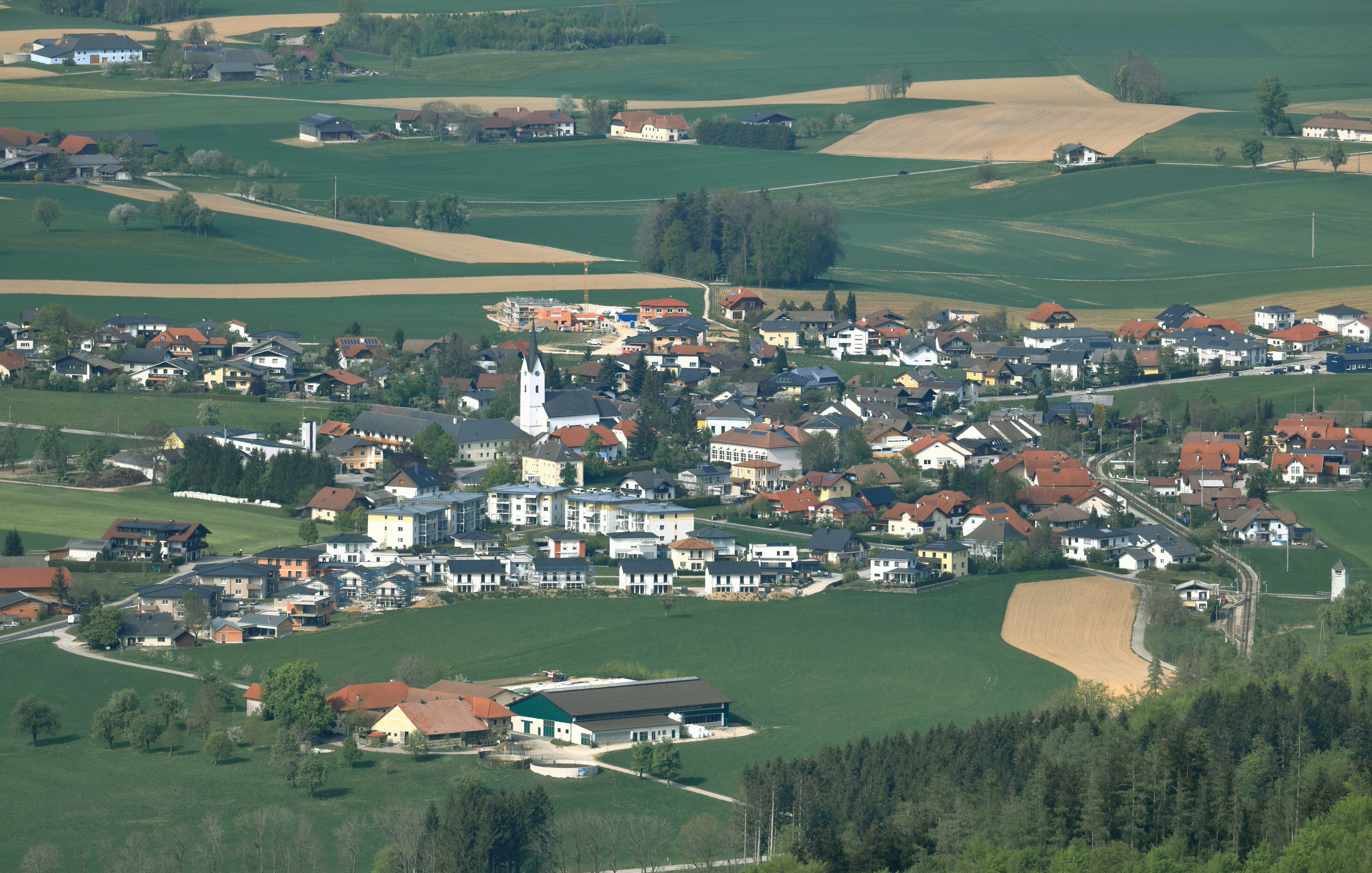 Südsüdwestansicht der oberösterreichischen Gemeinde Gschwandt bzw. Blick vom Grünberg auf Gschwandt bei Gmunden.